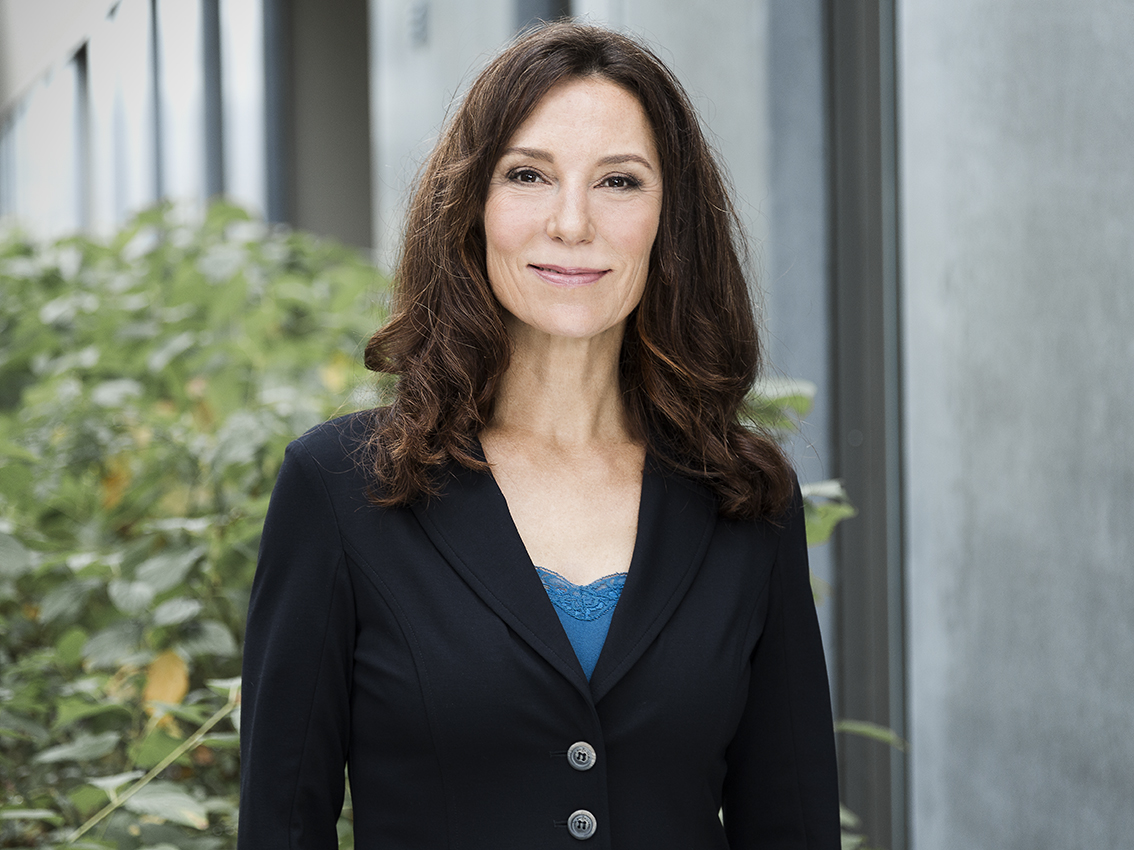 Kirsten Hanser, 2017, Fotograf: Robert Recker